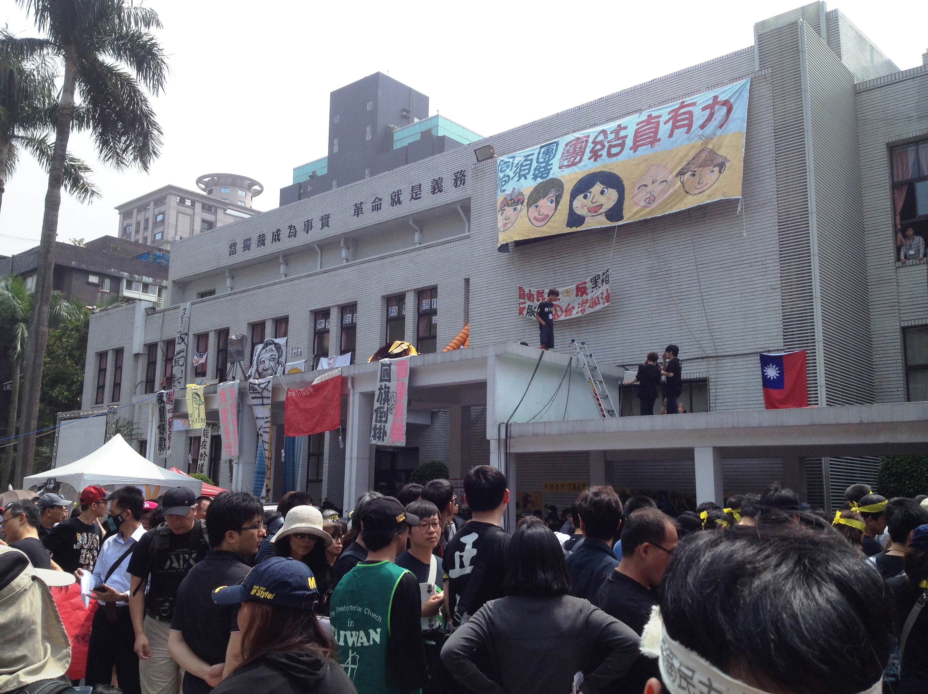 318太陽花學運